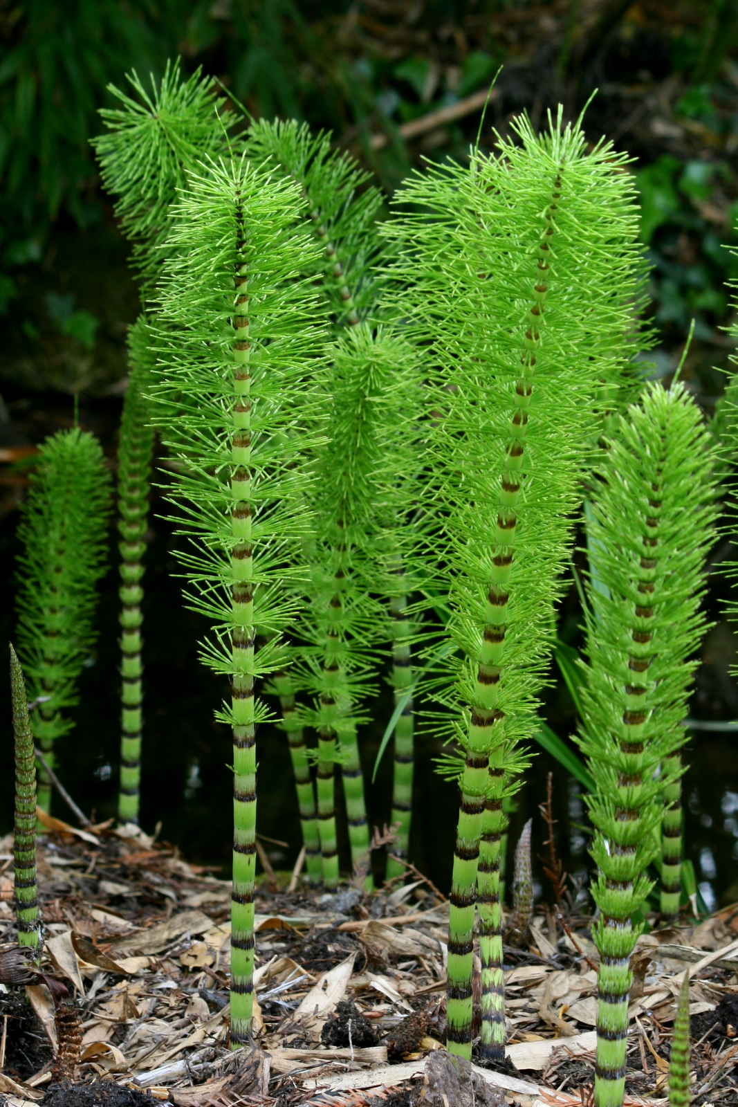 Equisetum telmateia (Equisetopsida) at Cambridge Botanic Garden